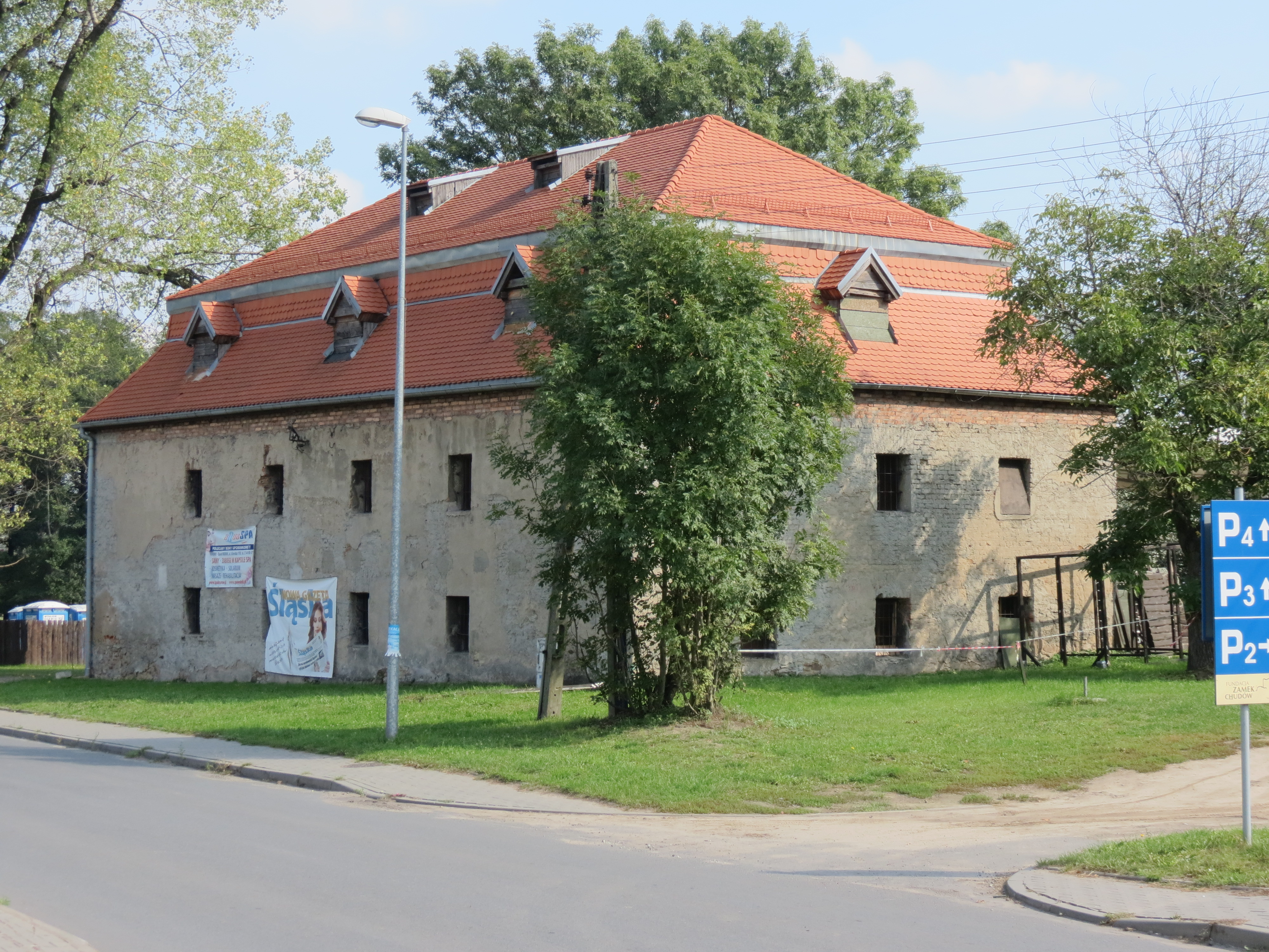 Chudów, ul. Wiejska - spichlerz dworski, z XVIII w., murowany (zabytek nr A/569/66)